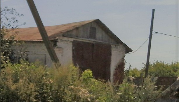 Конюшня усадьбы Терпигоревых. Сельцо Никольское Усманского уезда Тамбовской губернии.